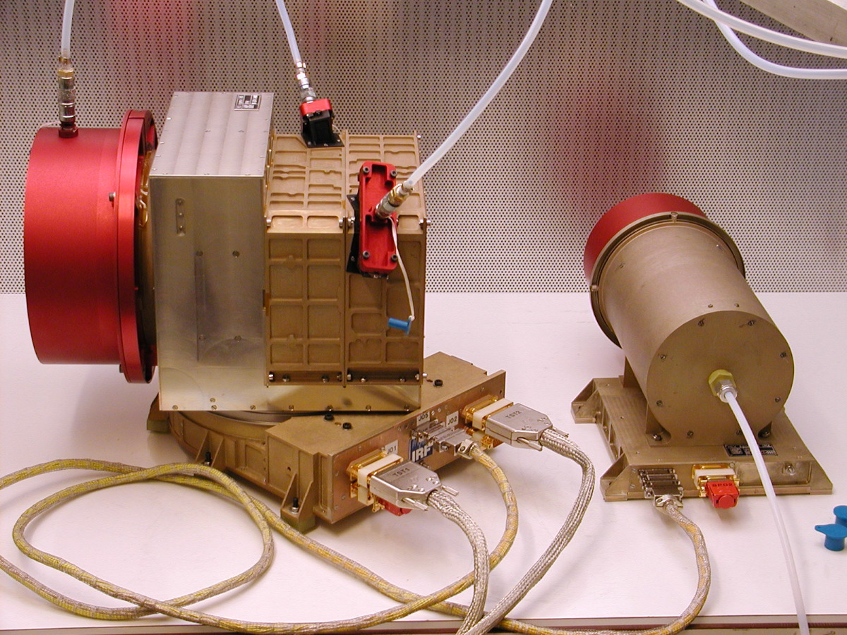 ASPERA-3 Instrument im Labor